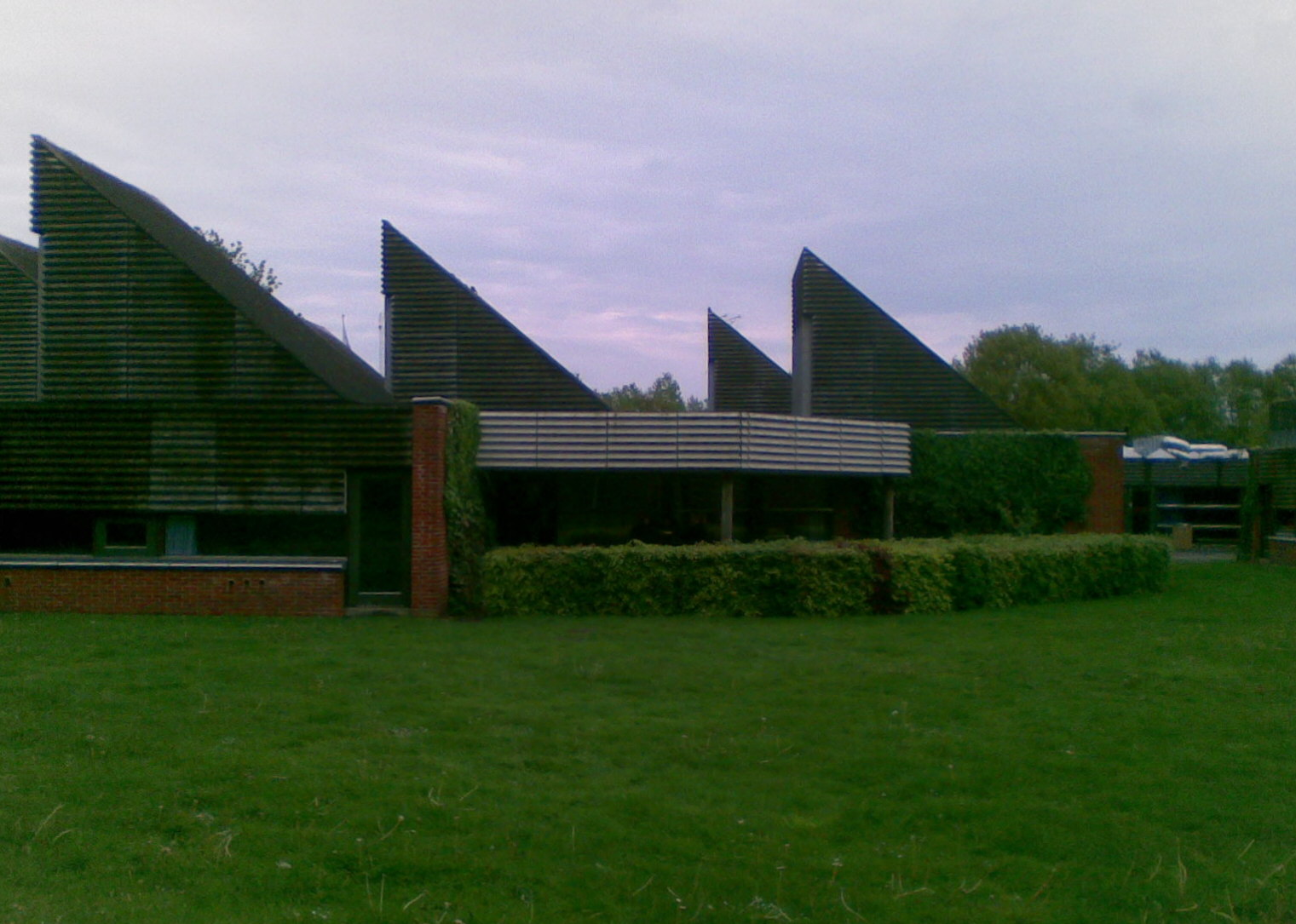 Himmelev Gymnasium, Roskilde, Denmark - rotated from original